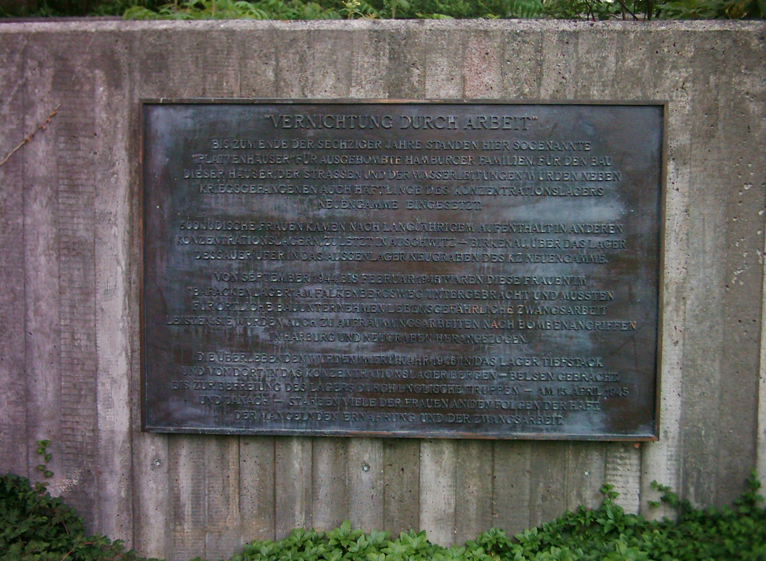 Gedenktafel Vernichtung durch Arbeit. Es erinnert an die Opfer des 2. Weltkriegs, die hier zur Arbeit gezwungen wurden und in Hamburger Konzentrationslagern ums Leben kamen. Die Tafel befindet sich am Ortsamt Süderelbe in Hamburg-Neugraben-Fischbek.